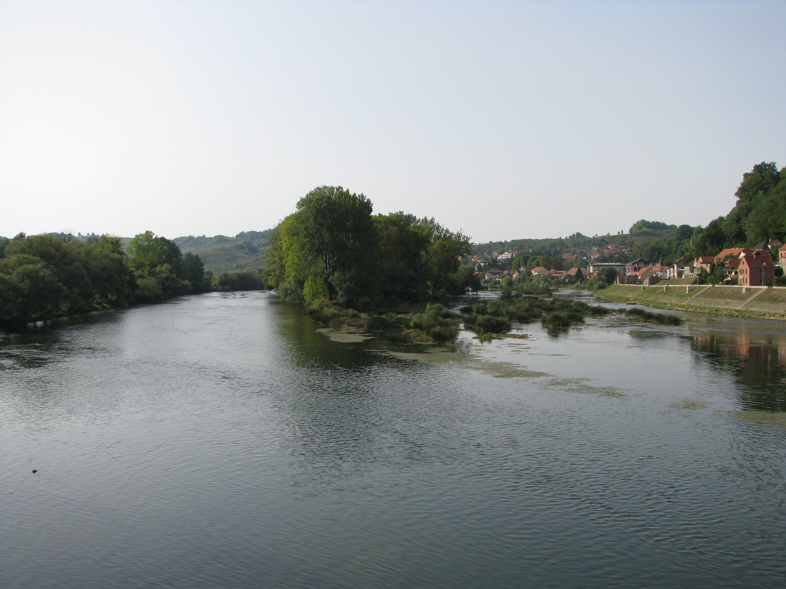 Rijeka Una u Hrvatskoj Kostajnici